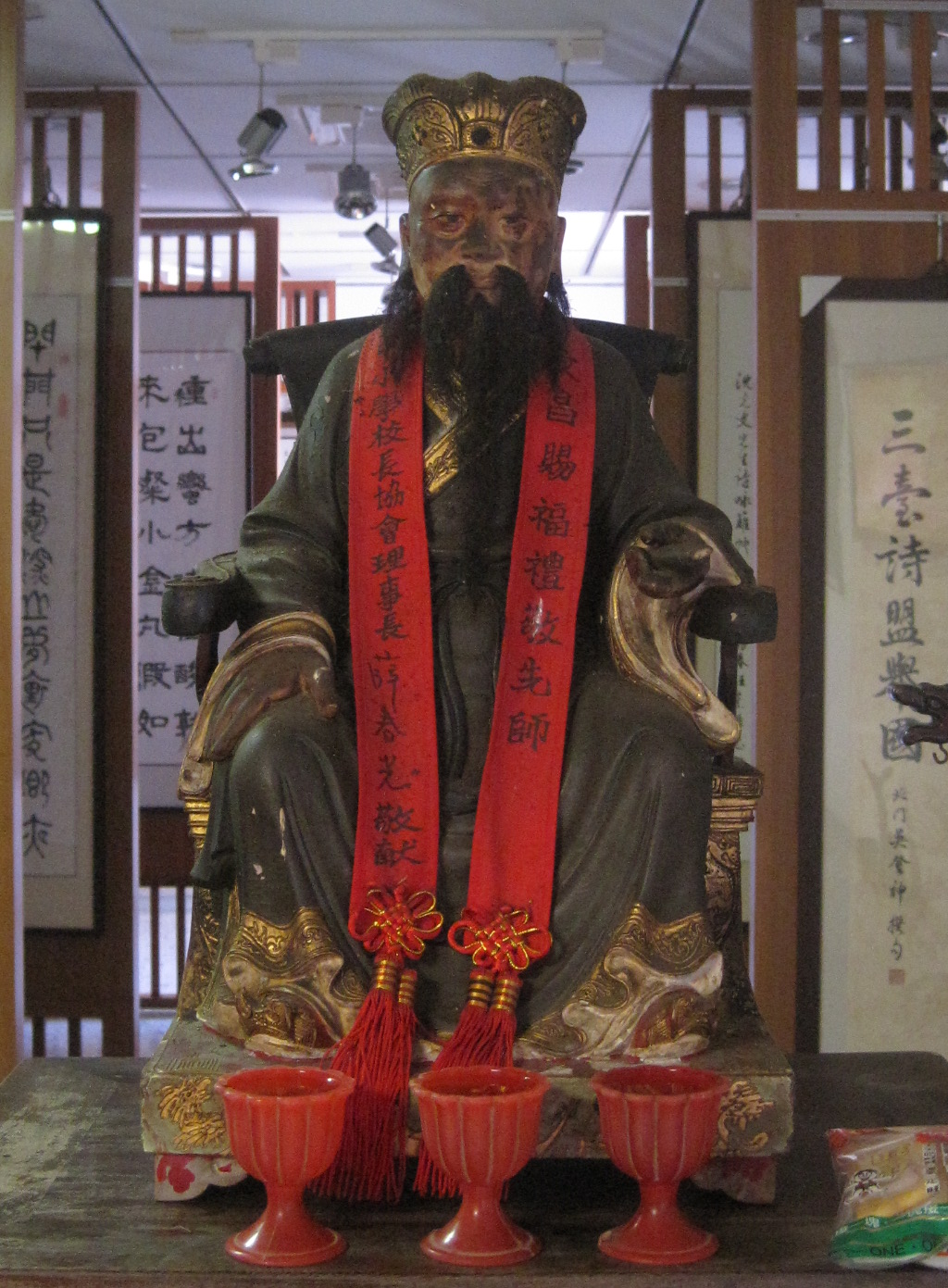 善化慶安宮沈光文像